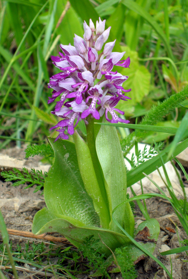 Hall käpp, üks levinuimaid orhideesid Lääne-Eestis. Pildistatud 2011. aasta kevadel Matsalus.